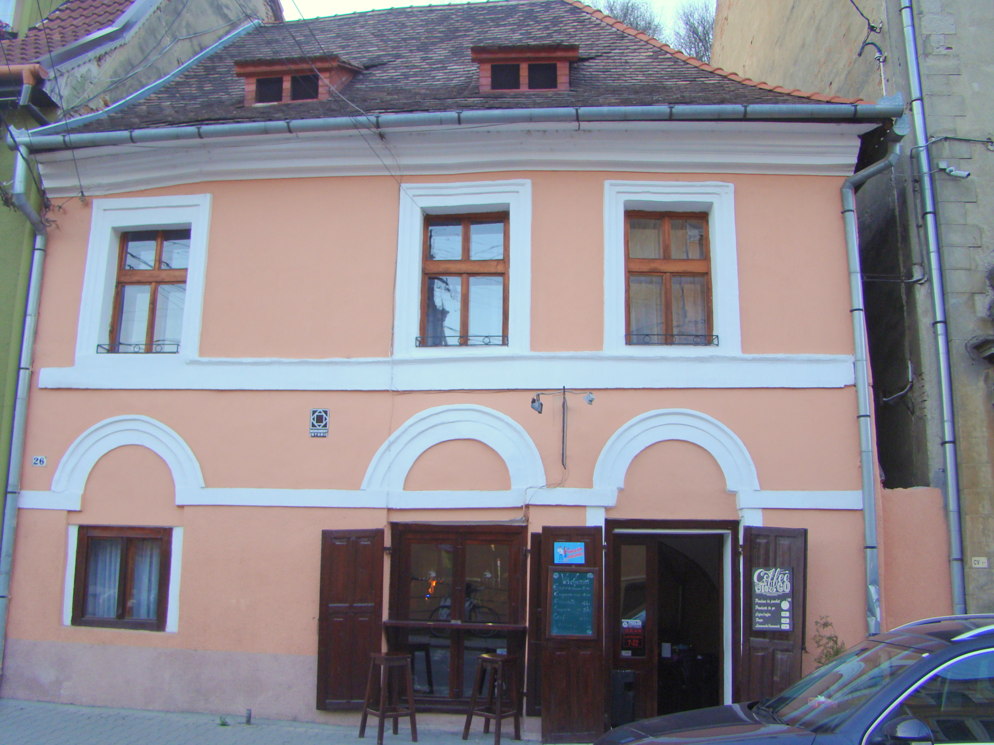 Casă, municipiul Sighișoara, str. Chendi Ilarie 26 sf. sec. XVIII